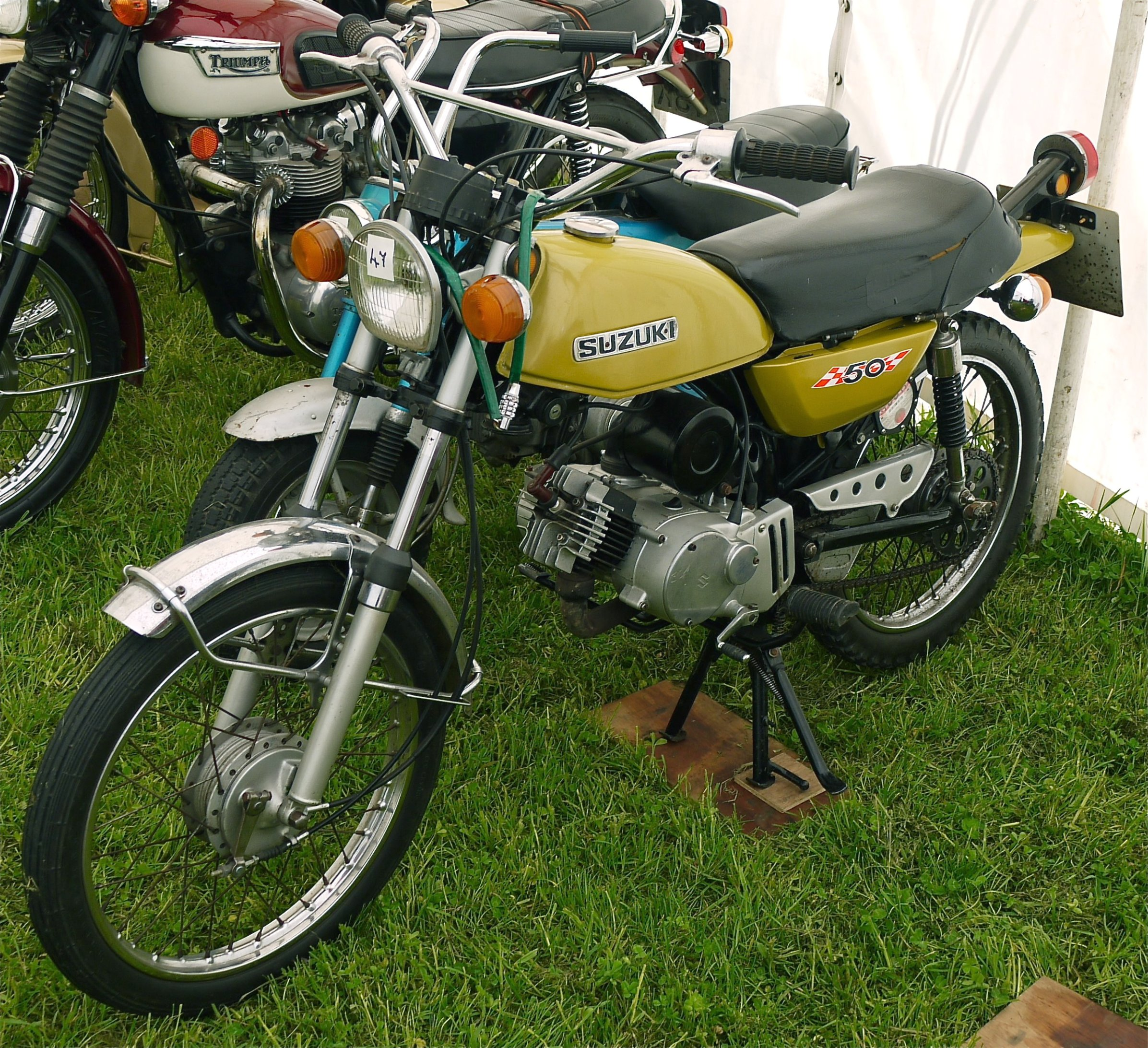 Panasonic G1 14-45 Lens